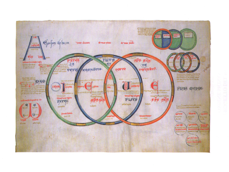 Liber figurarum tav 11